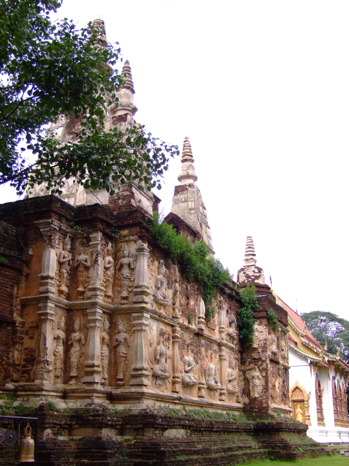 วัดเจ็ดยอด จ.เชียงใหม่ หรือชื่อทางการ วัดโพธารามมหาวิหาร หรือชื่ออื่นคือ วัดเจ็ดยอดโพธาราม หมวดหมู่:ภาพวัดไทย สัญญาอนุญาต The present photo is taken or owned by Thanyakij. The camera used was: Fujifilm Finepix S9500.